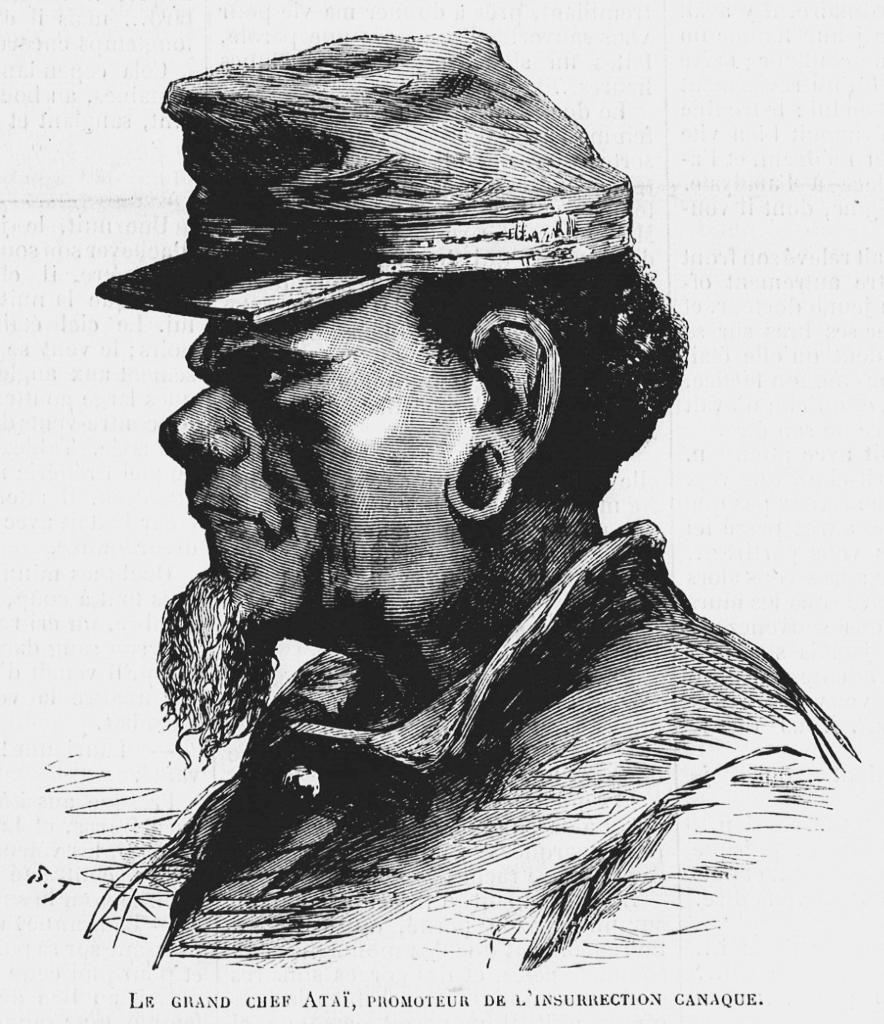 Gravure parue en première page du journal Le Voleur n°1109 du 4 octobre 1878. Portrait du chef Kanak Ataï.